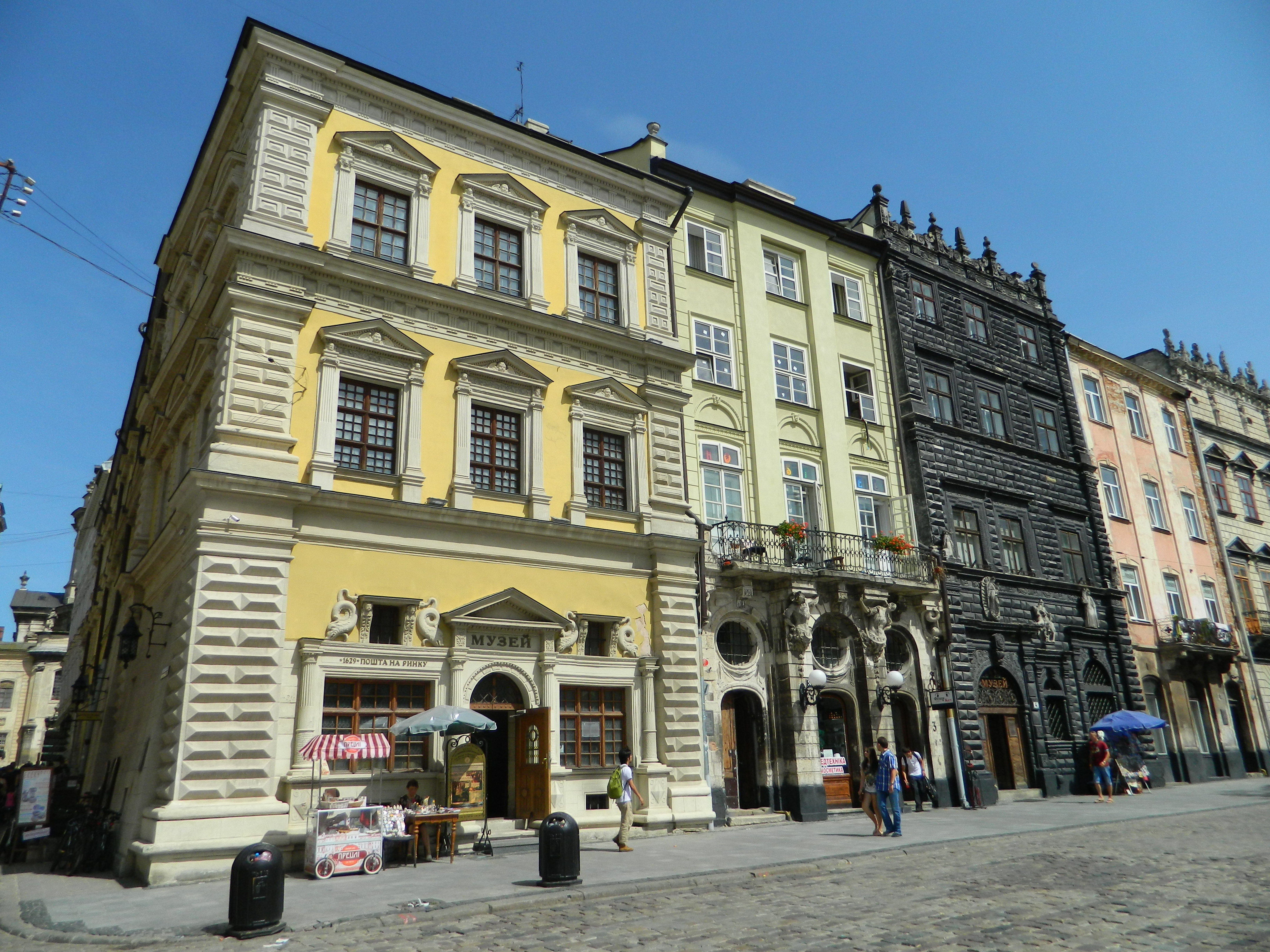 Дворец Бандинелли, Львов